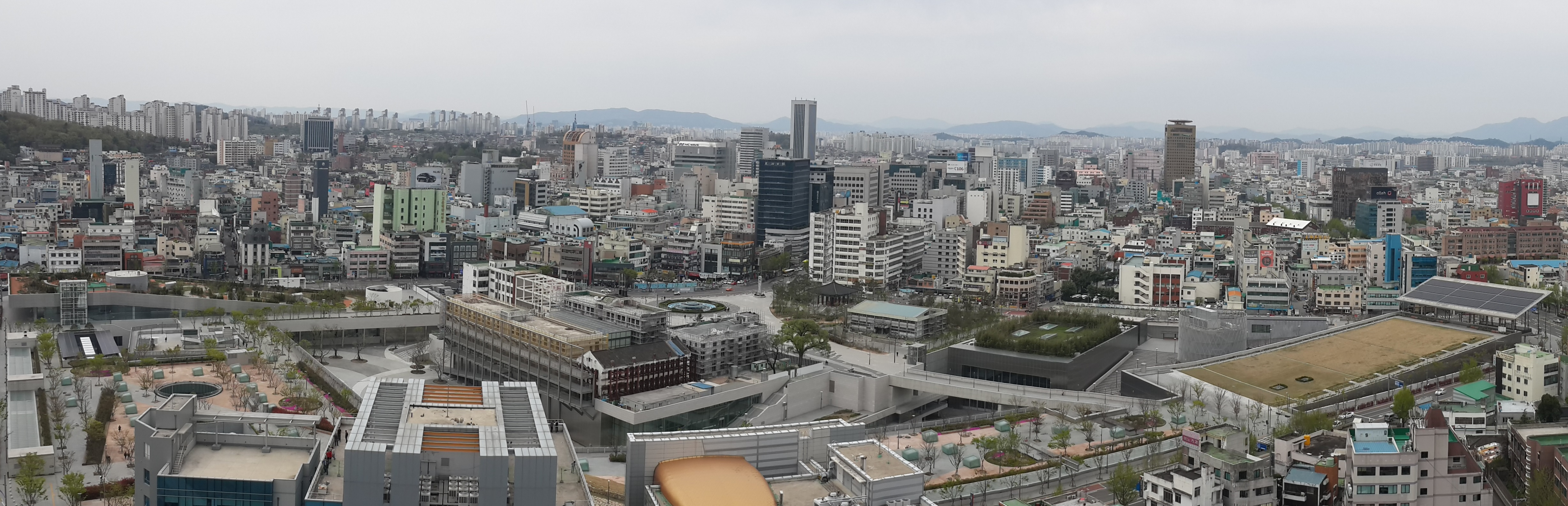 국립아시아문화전당 전경